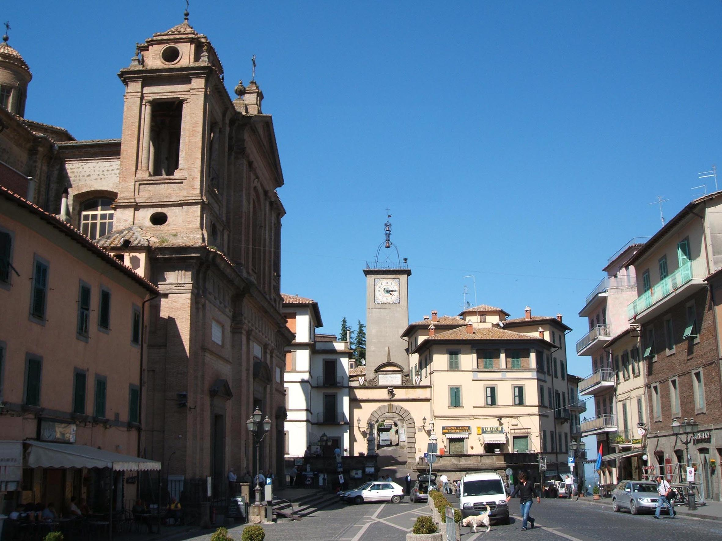 Soriano nel Ciminio